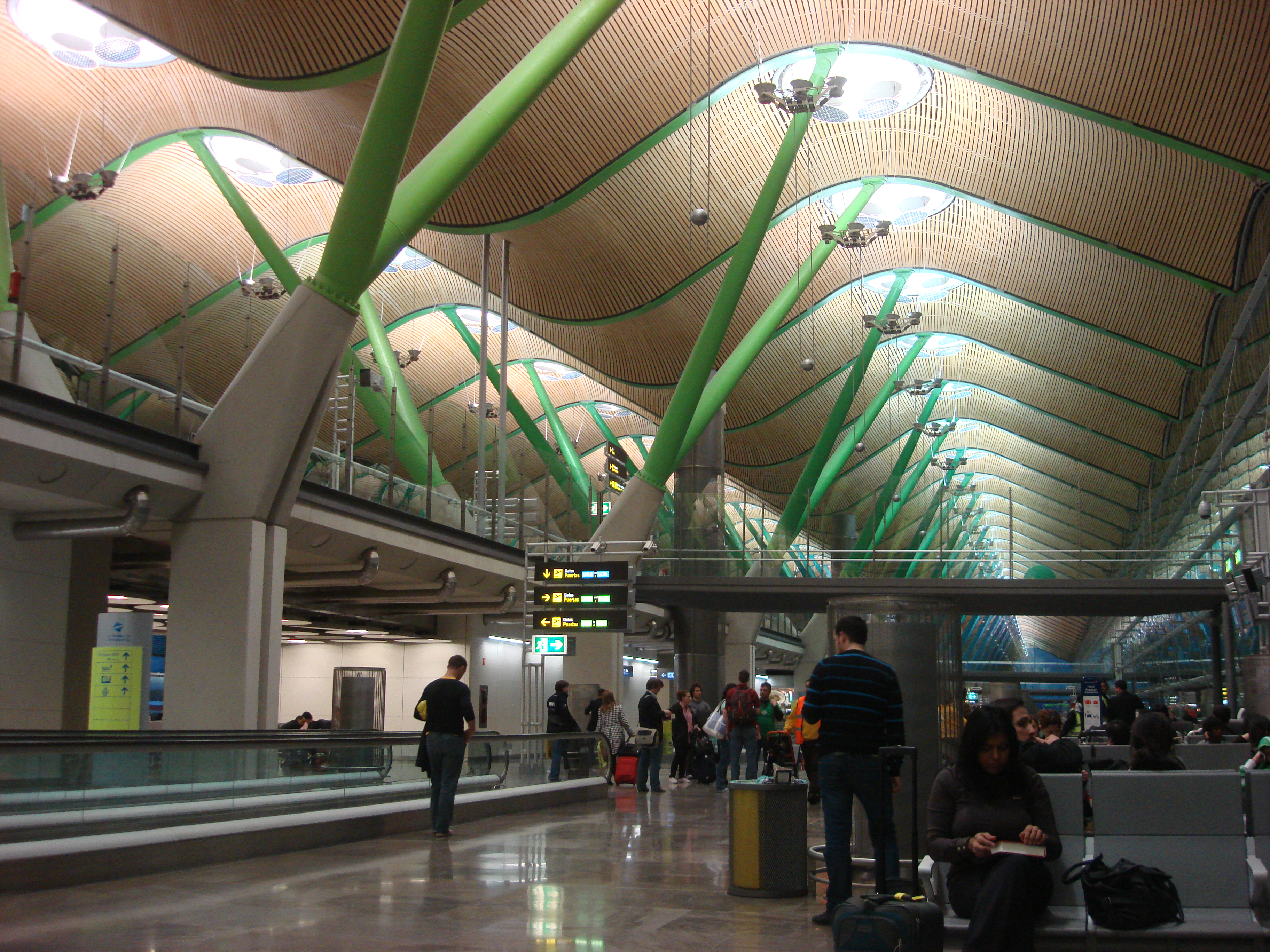 Own work